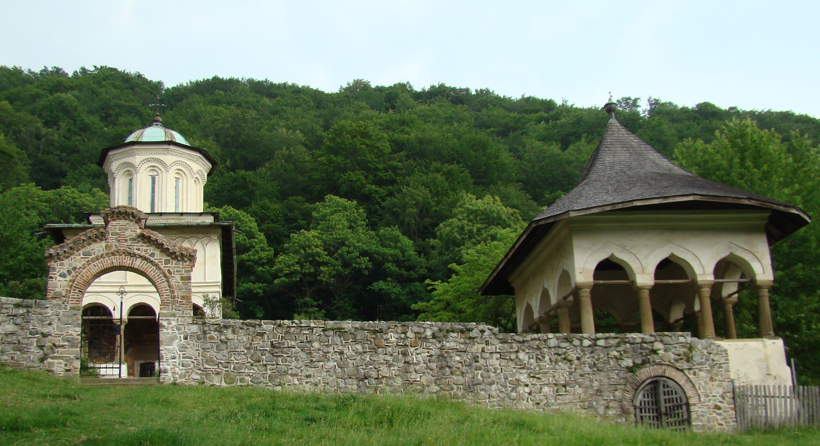 Bolnița „Adormirea Maicii Domnului”, Mănăstirea Hurezi, Vâlcea